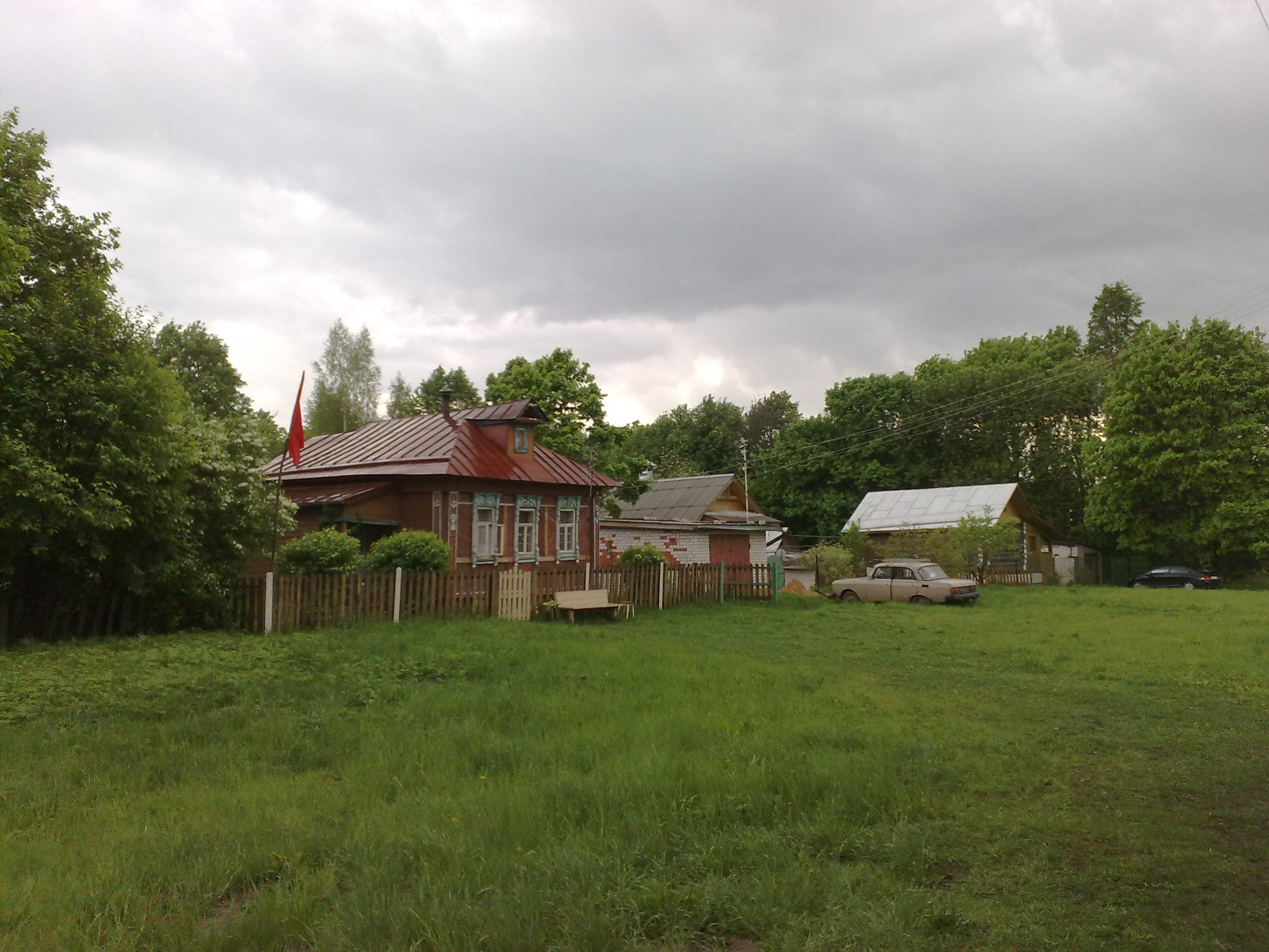 Деревня Кулаково, Вачский район, Нижегородская область. Типичный деревенский дом